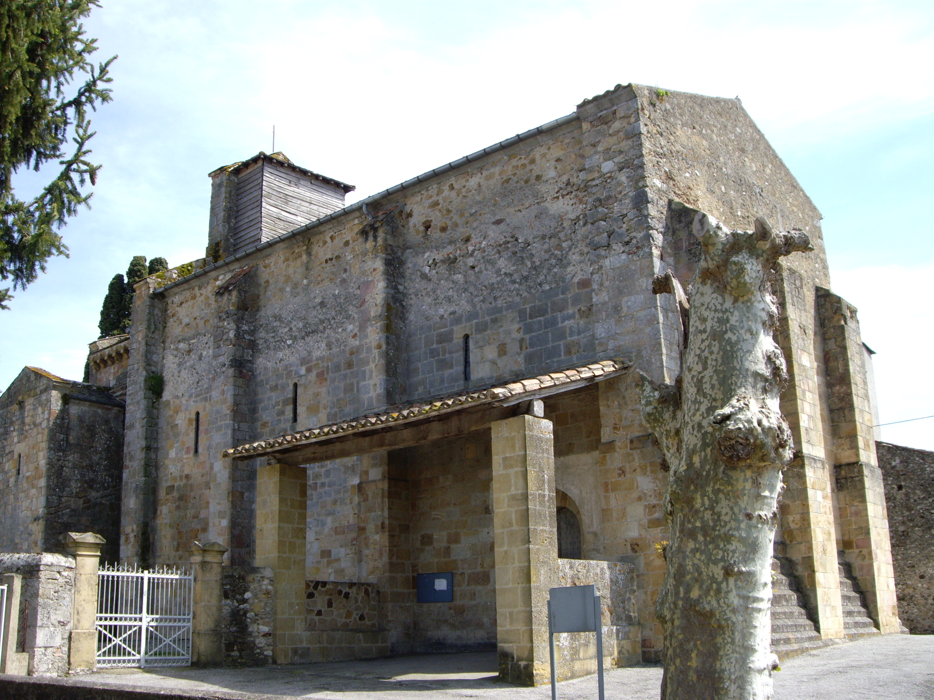 Église Saint-Jean-de-Verges (09)